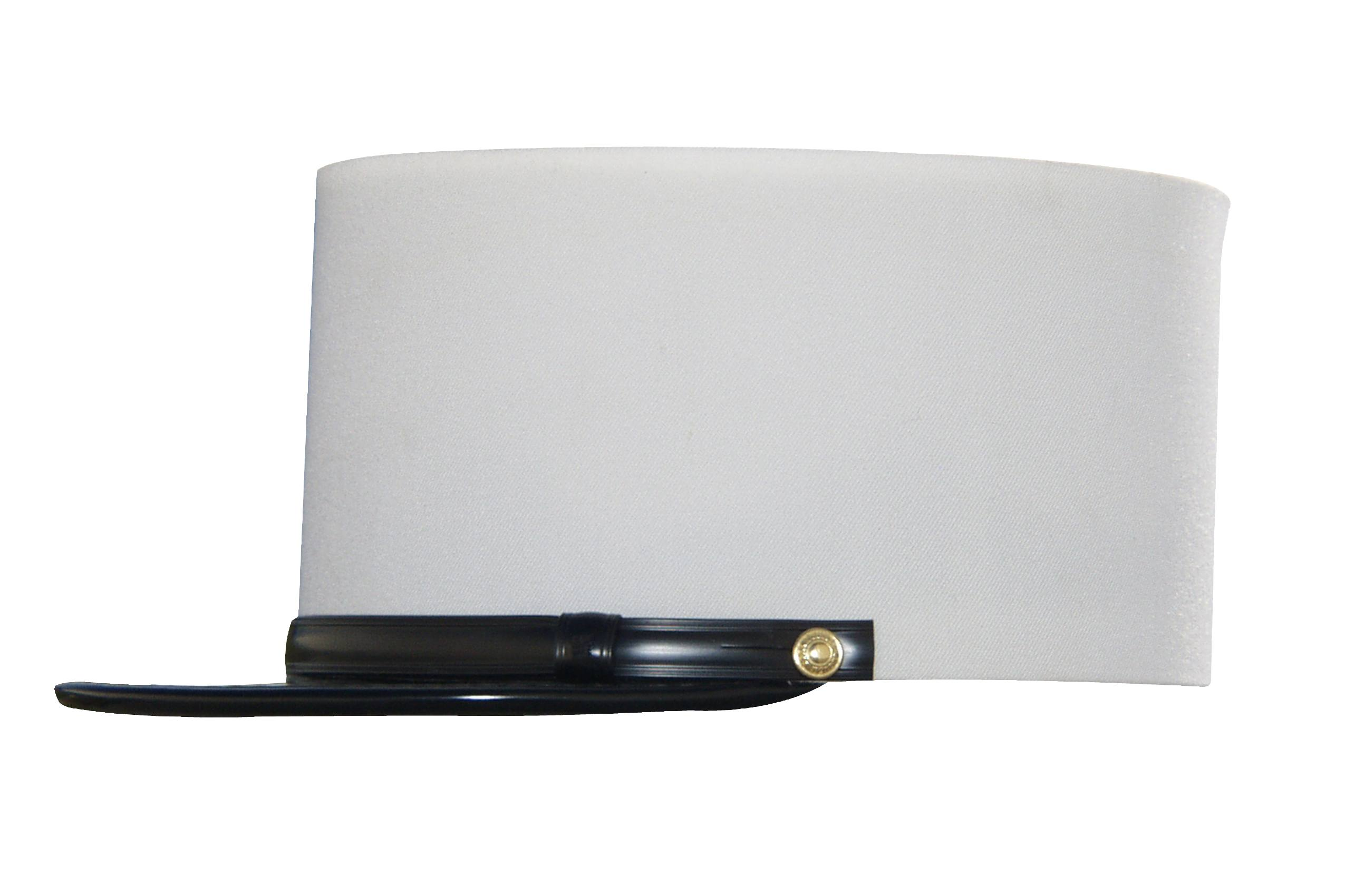 képi blanc de la Légion étrangère vu de profile